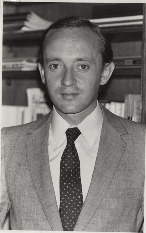 Miguel Ángel Poduje, Ministro de Vivienda y Urbanismo de Chile entre 1984 y 1988.